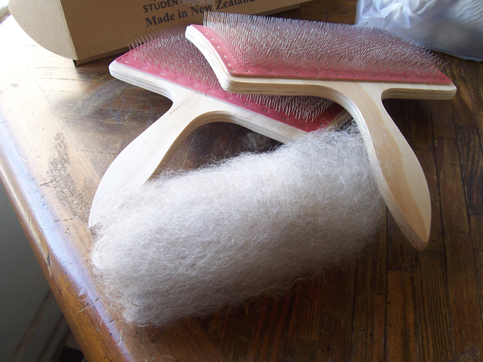 Kardierbürste